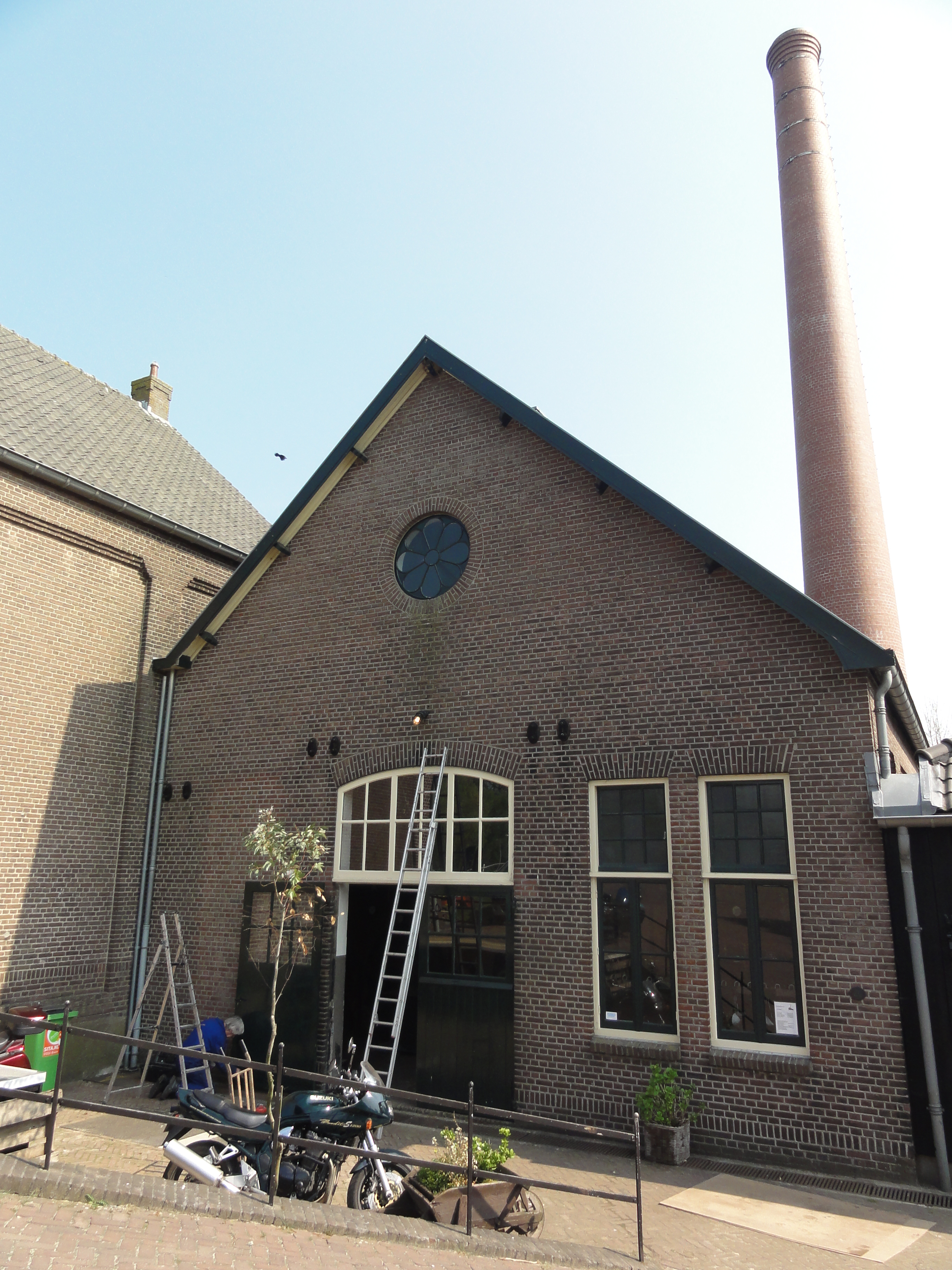 Appeltern, ketelhuis voorkant met schoorsteen 04″ N, 5° 35′ 27.52″ E